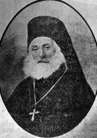 Мелетиос Драмски